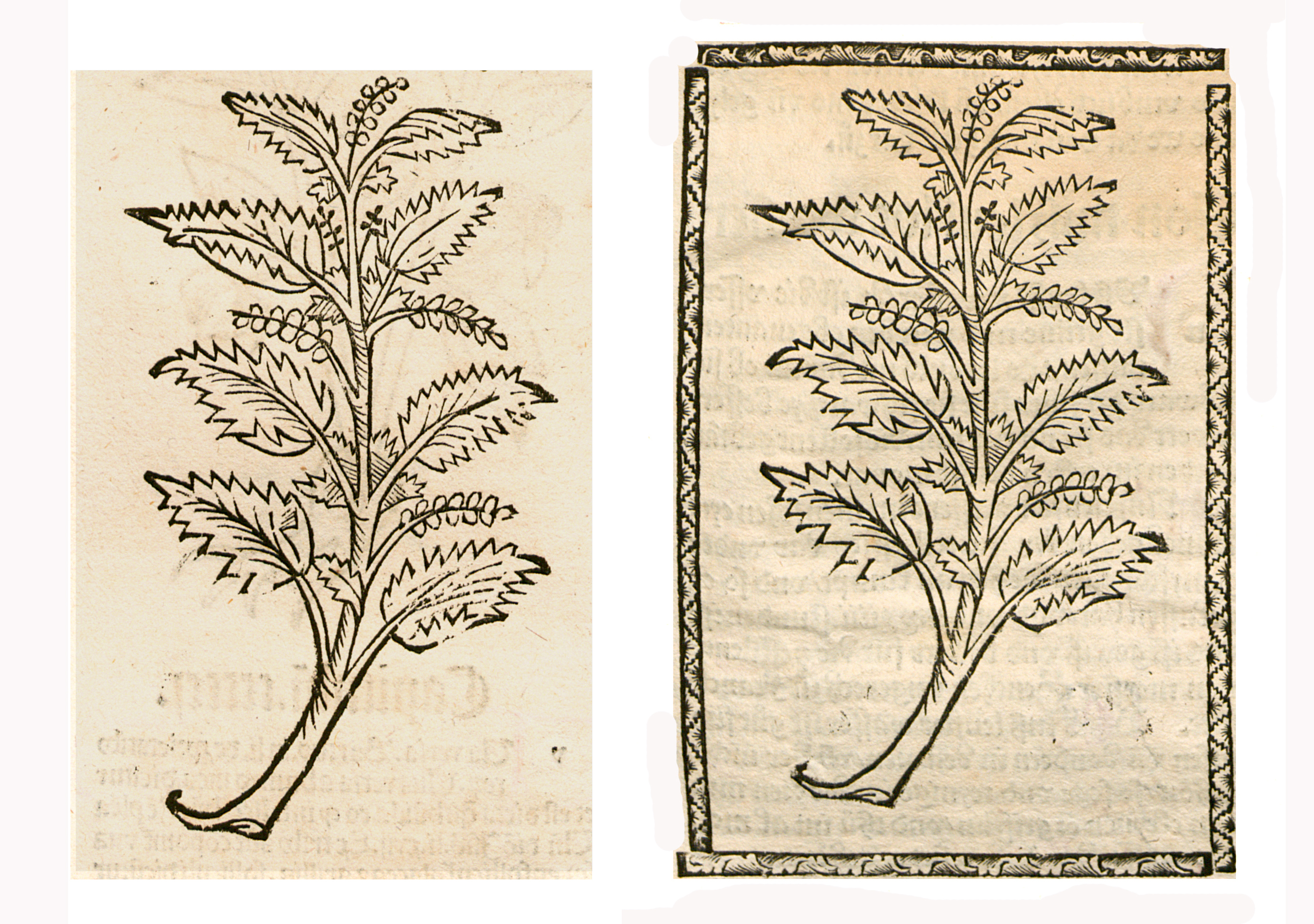 Abbildung von: Nessel Wurtzel (Urtica dioica)